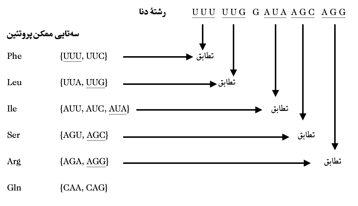 هم‌ترازسازی با در نظر گرفتن جهش دگرقالب این خروجی را تولید می‌کند.